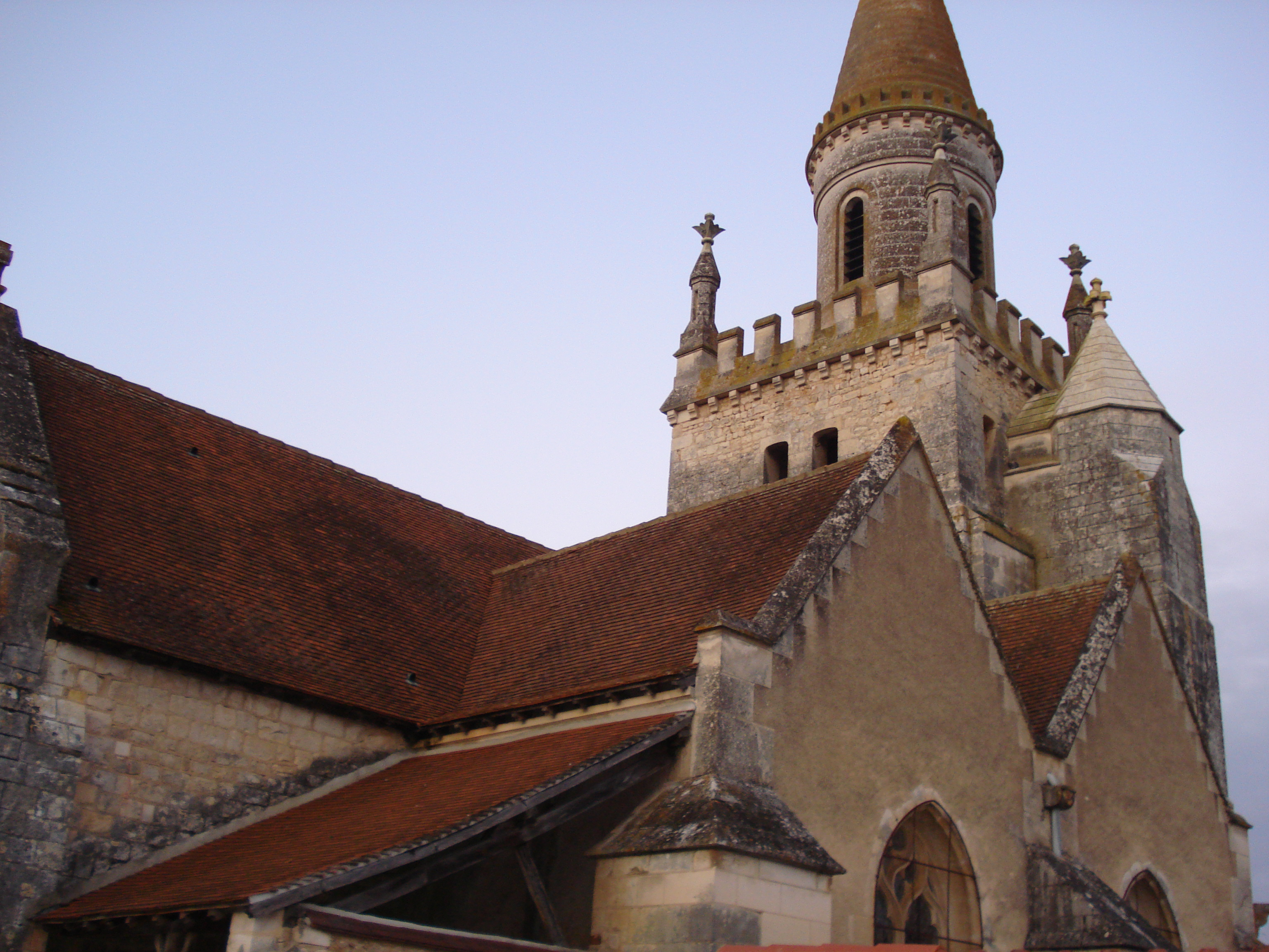 L'église